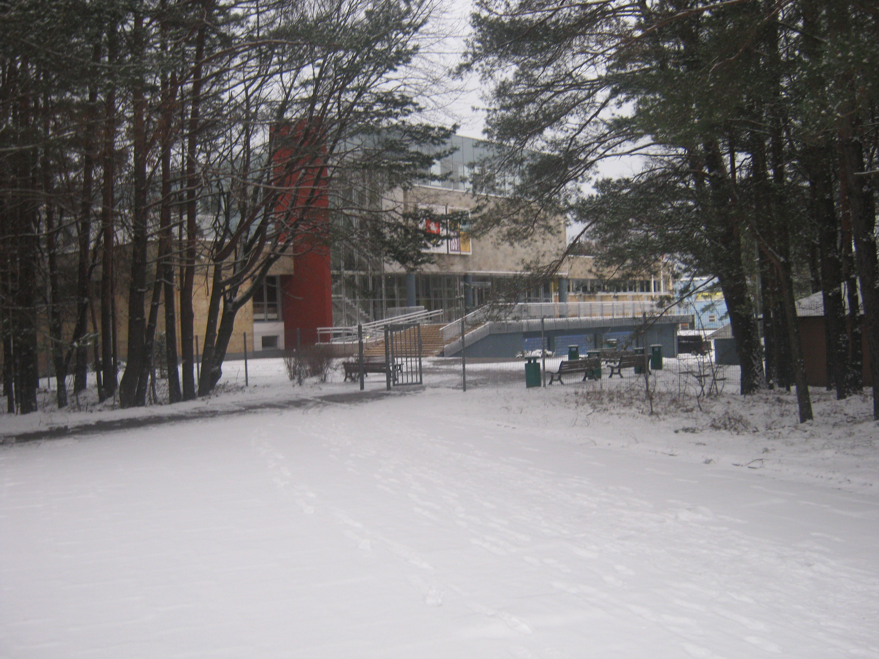 Tarptautinio verslo mokykla